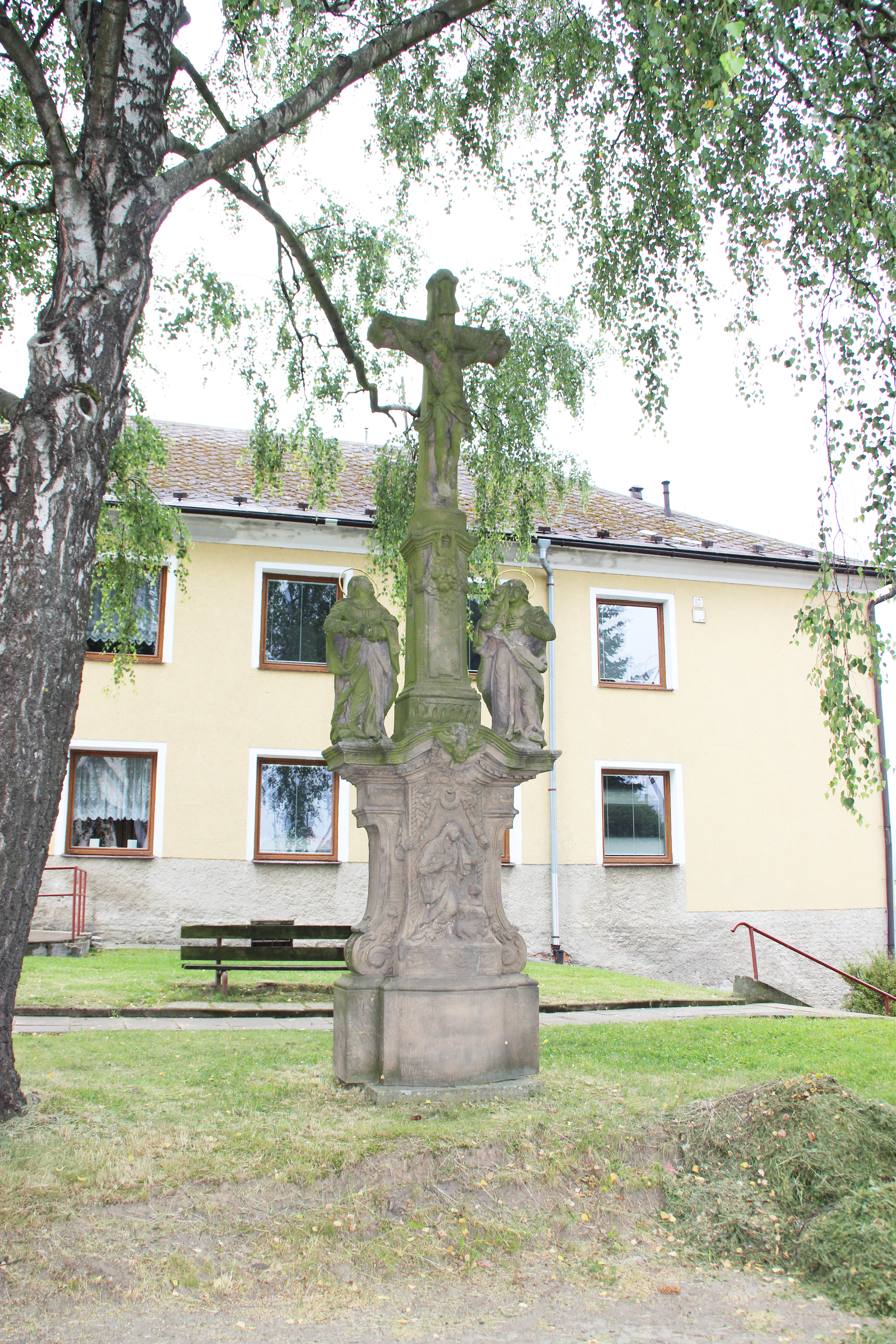 Sousoší Kalvárie (v areálu kostela)